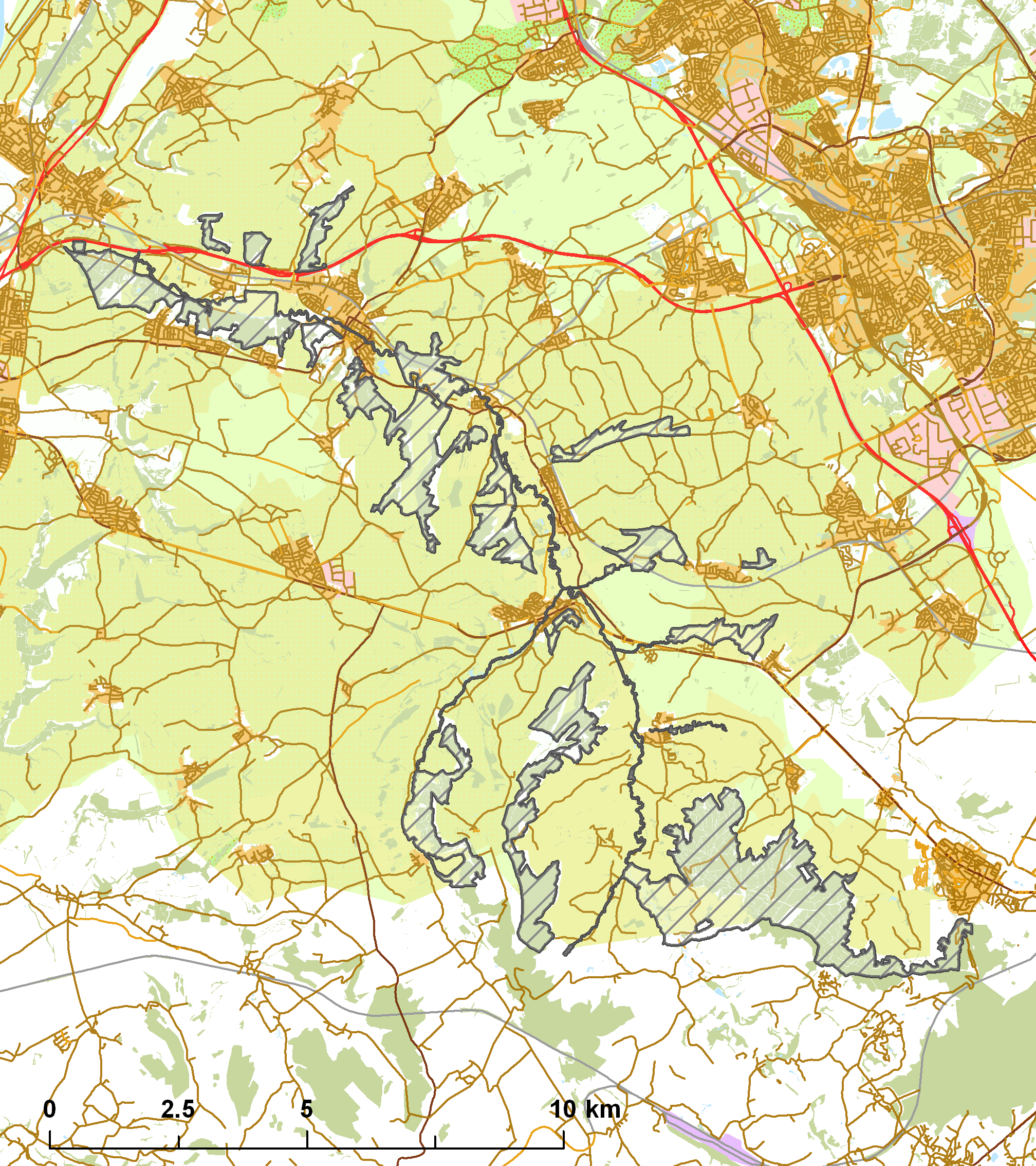 Natura2000 - Geuldal.png